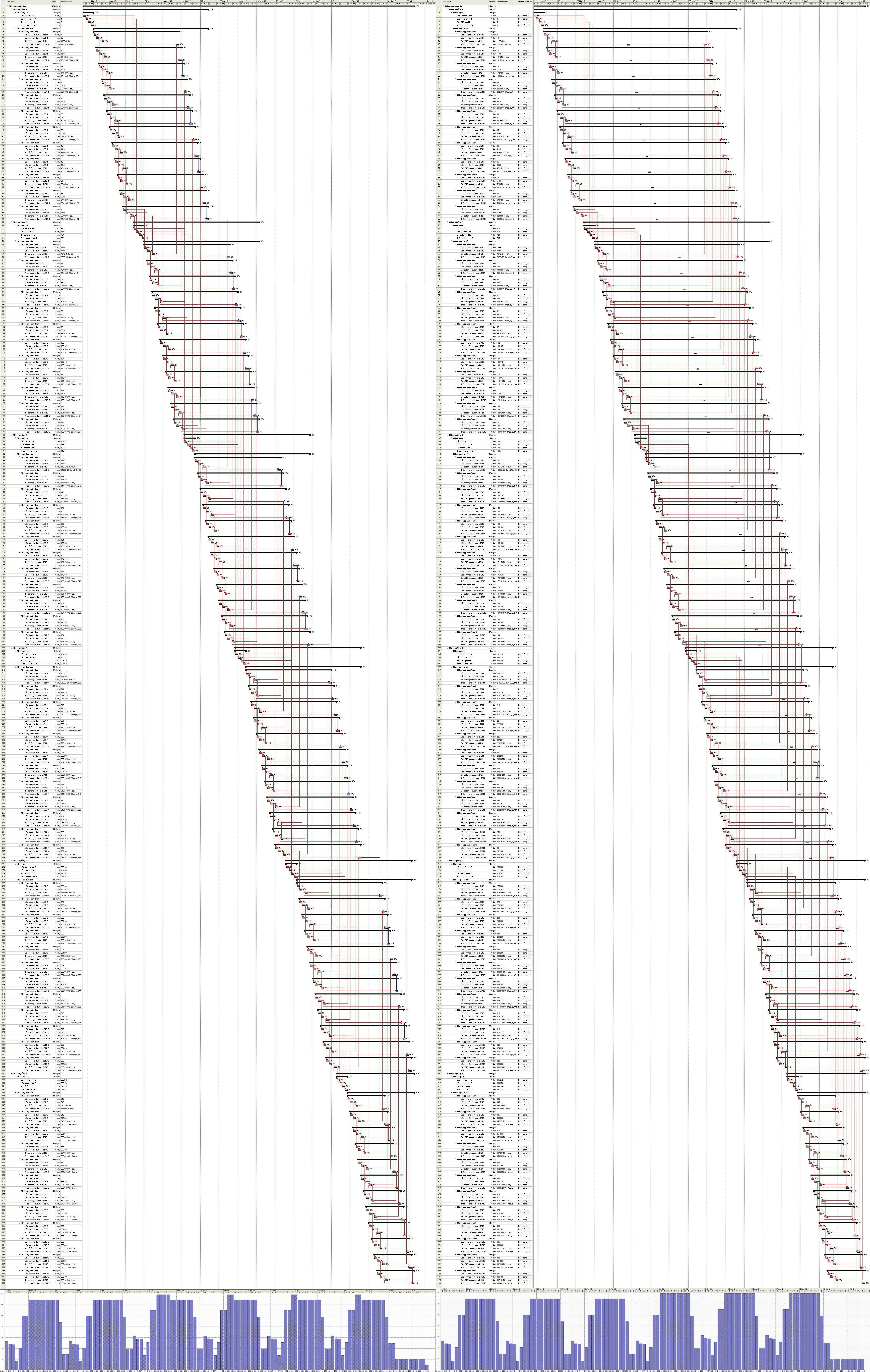 Tiến độ phần thân nhà nhiều tầng được tổ chức thực hiện theo phương pháp tổ đội chuyên môn.